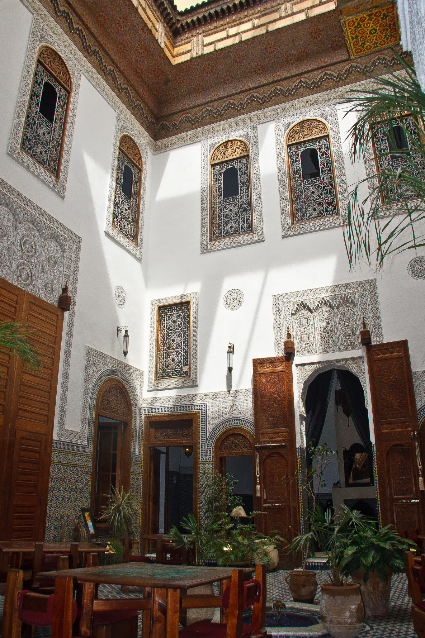 Our hotel in Fez